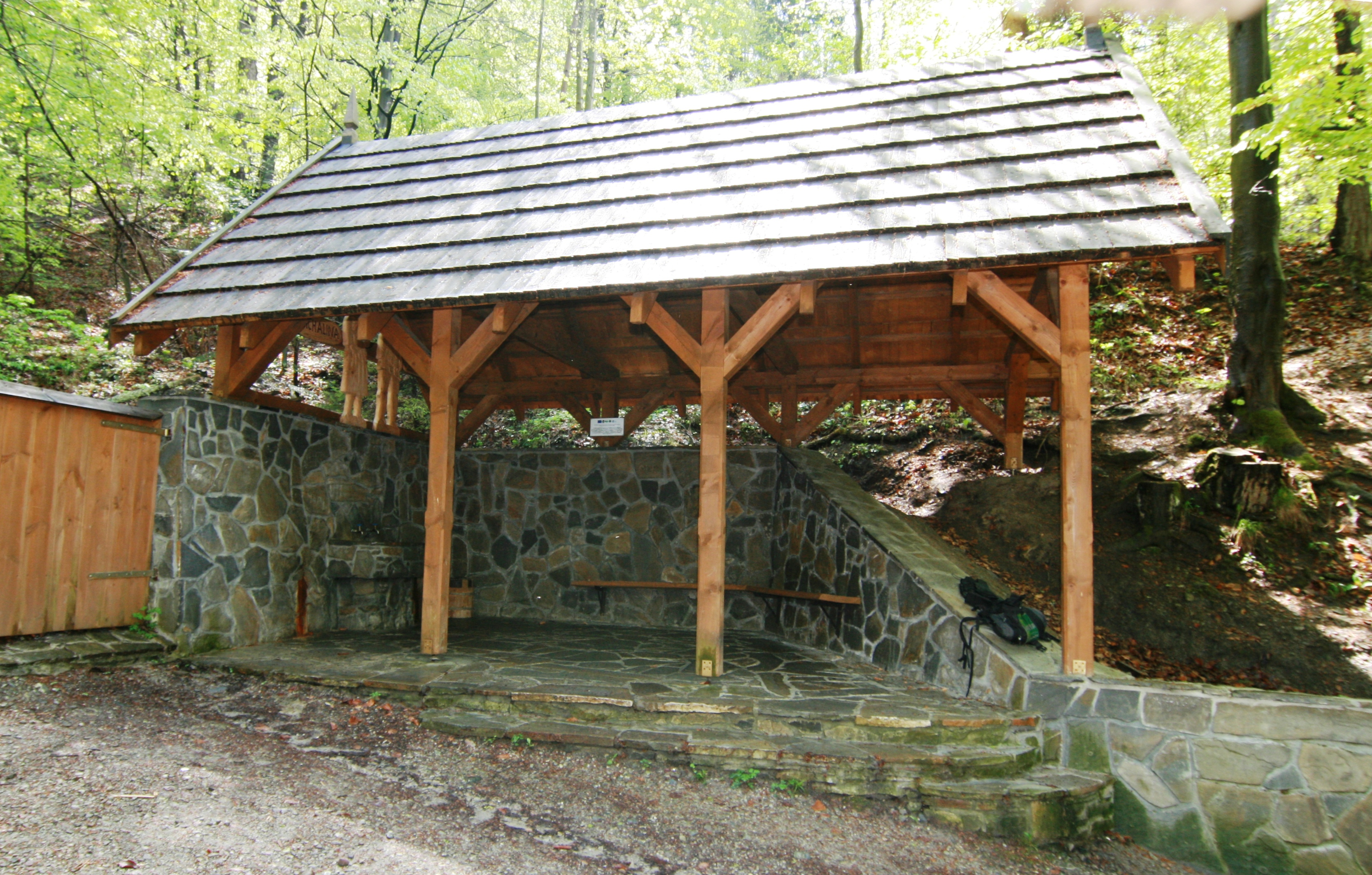 Ujęcie źródeł wody mineralnej Stefan i Michalina w Krościenku nad Dunajcem - widok z zewnątrz